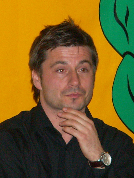 Arkadiusz Bilski - former Korona Kielce player